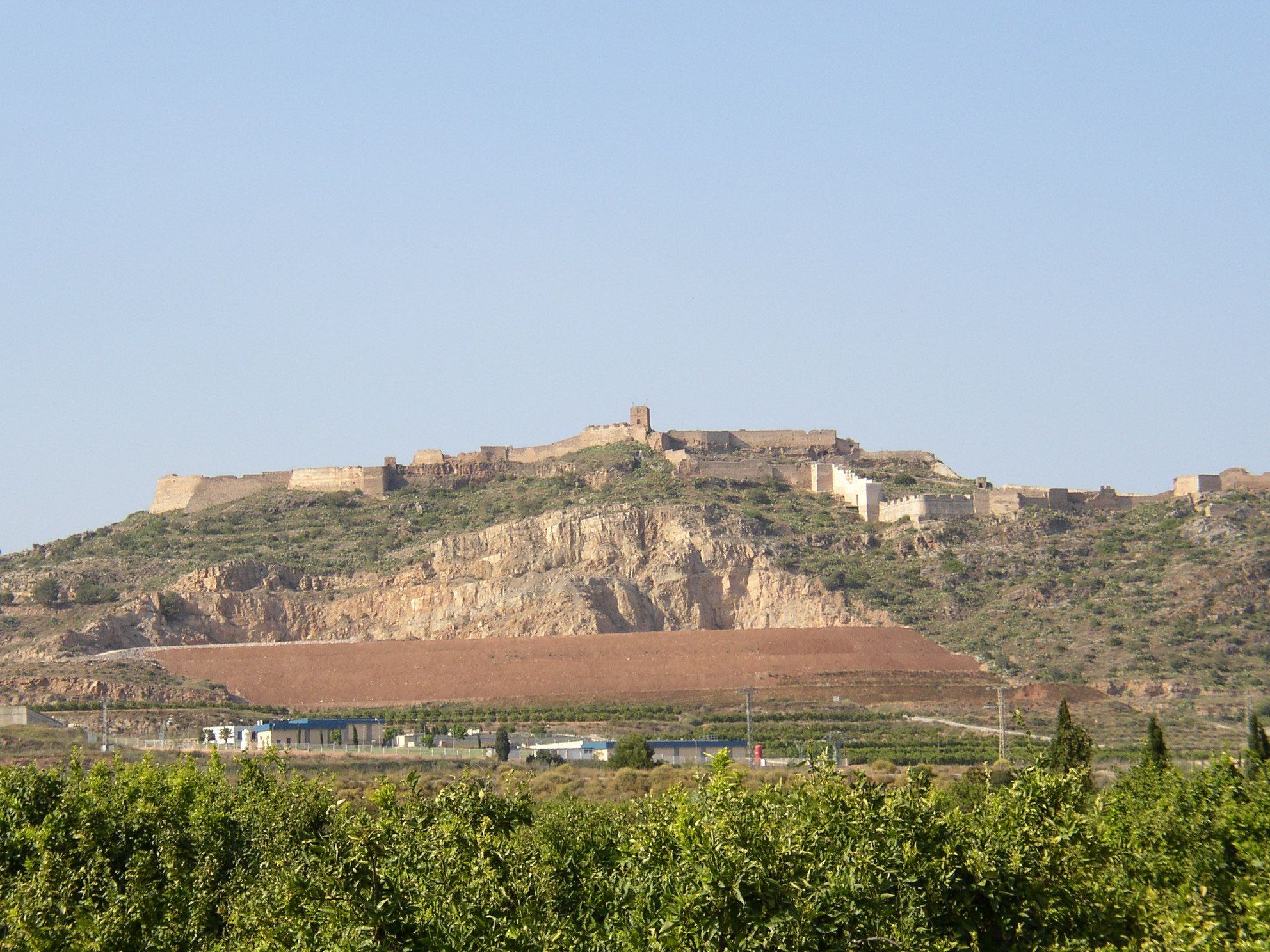 Castillo de Sagunto. Valencia (Comunidad Valenciana) España.